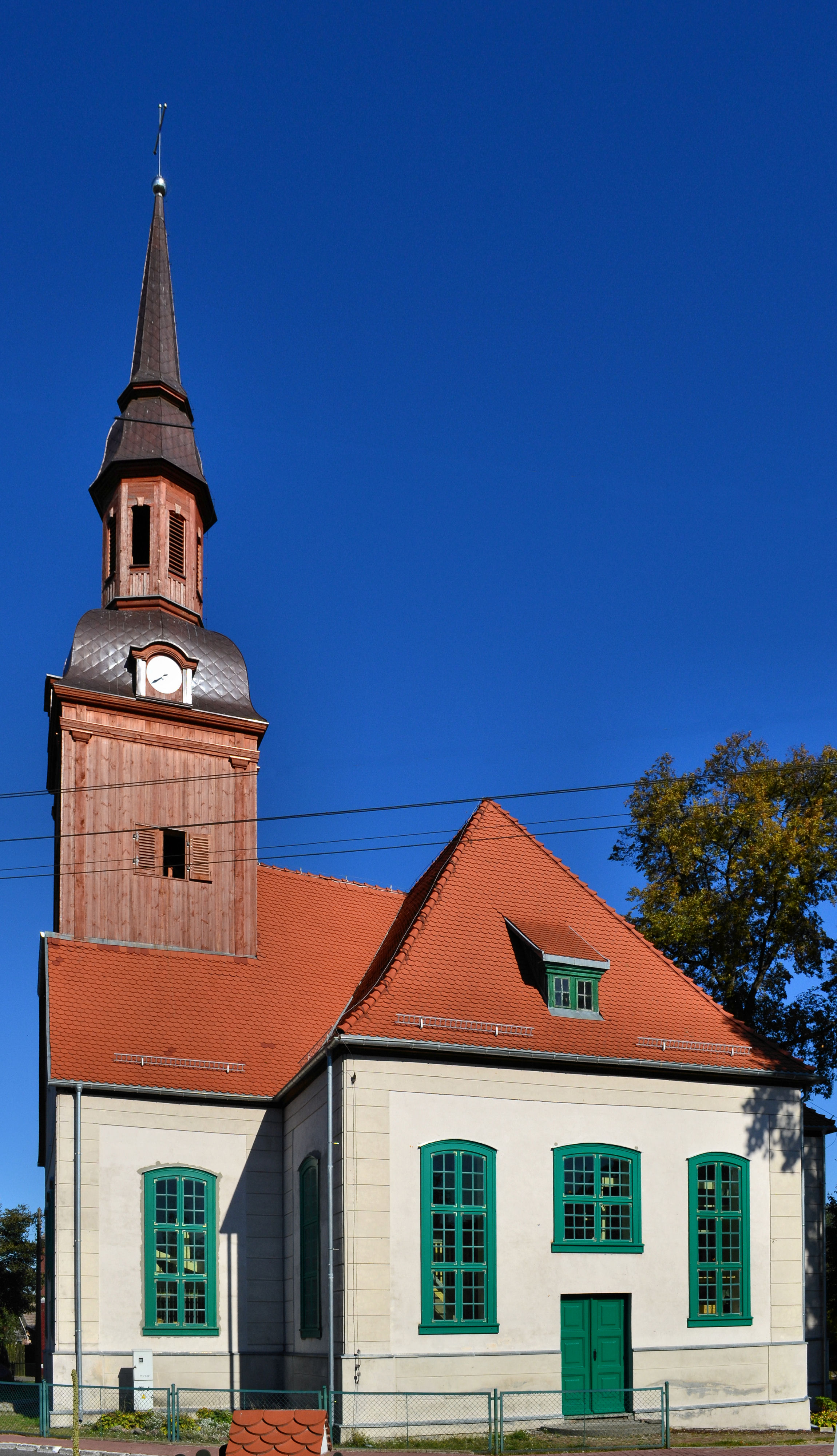 Stepnica